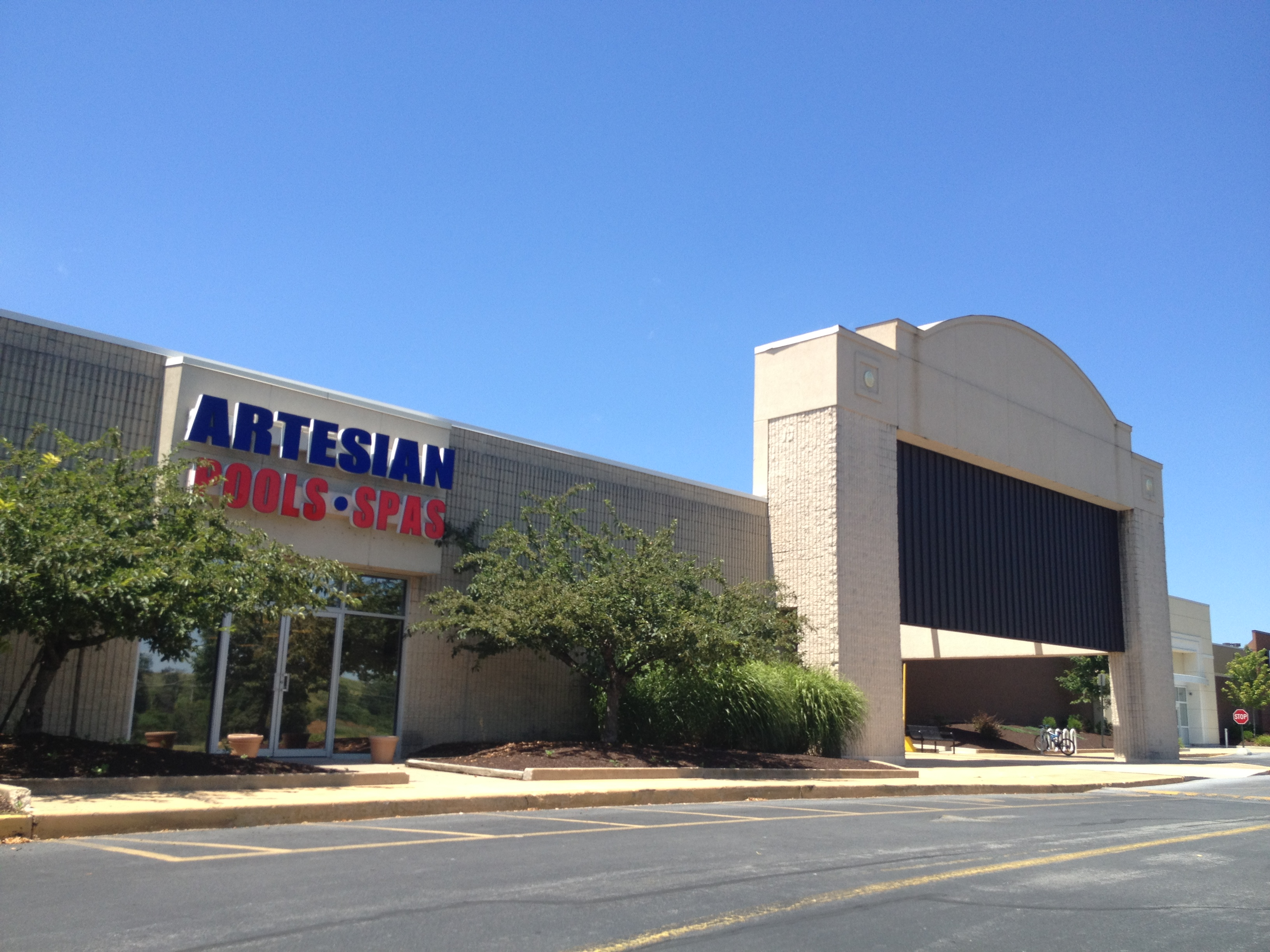 West Manchester Mall